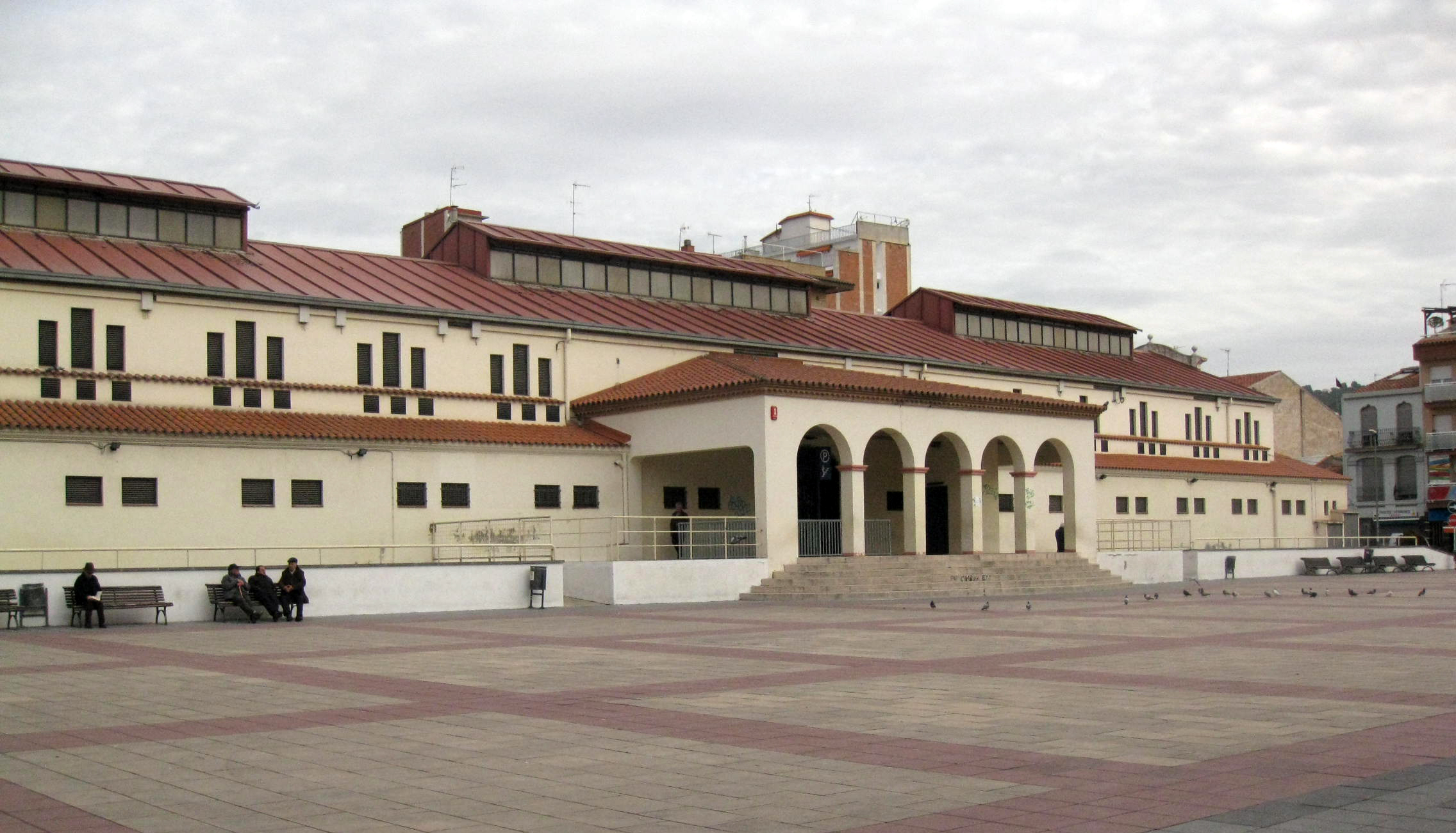 Mercat municipal (Olesa de Montserrat) Object location41° 32′ 34.05″ N, 1° 53′ 36.52″ E